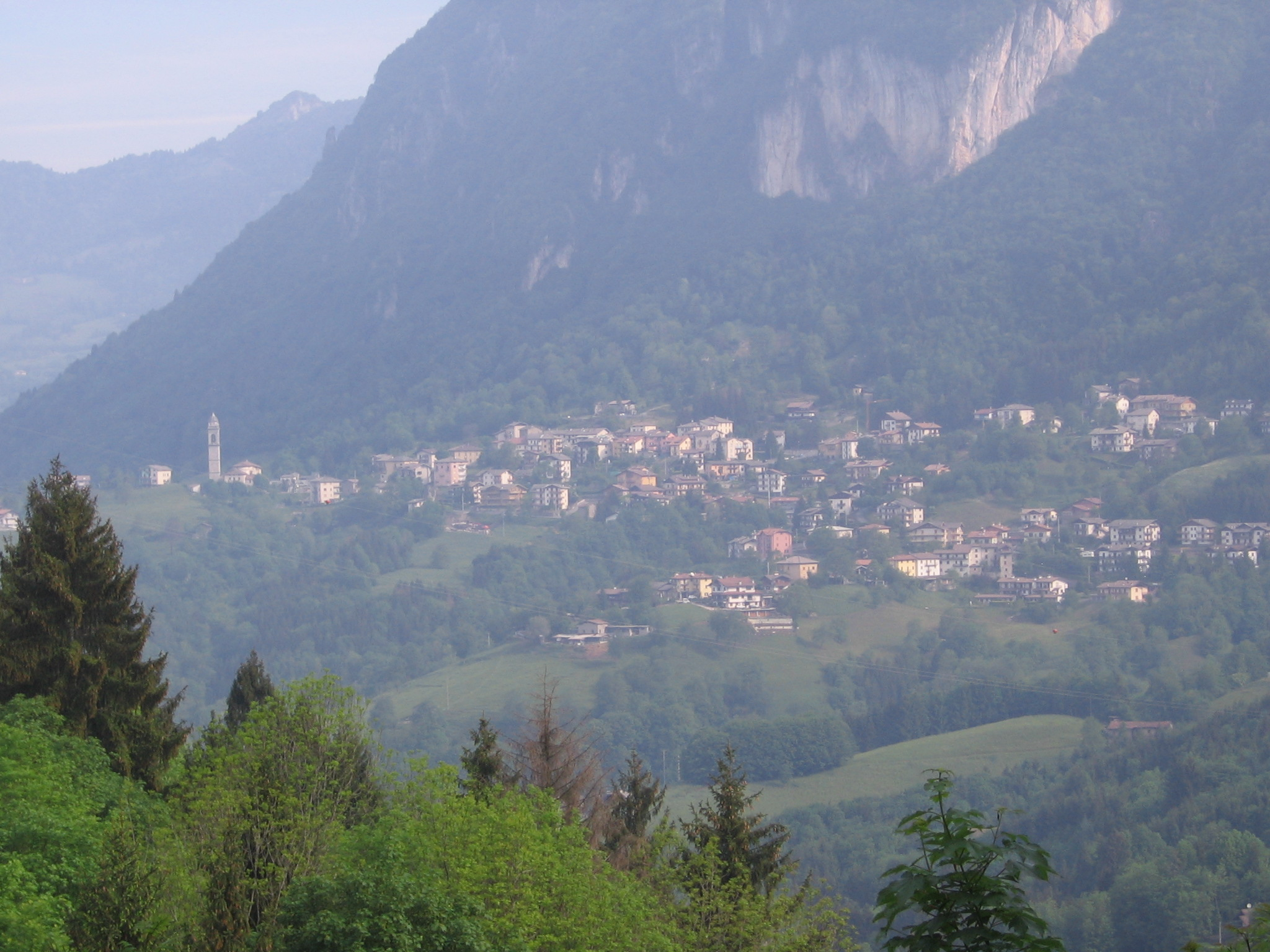 Cornalba, Bergamo, Italia